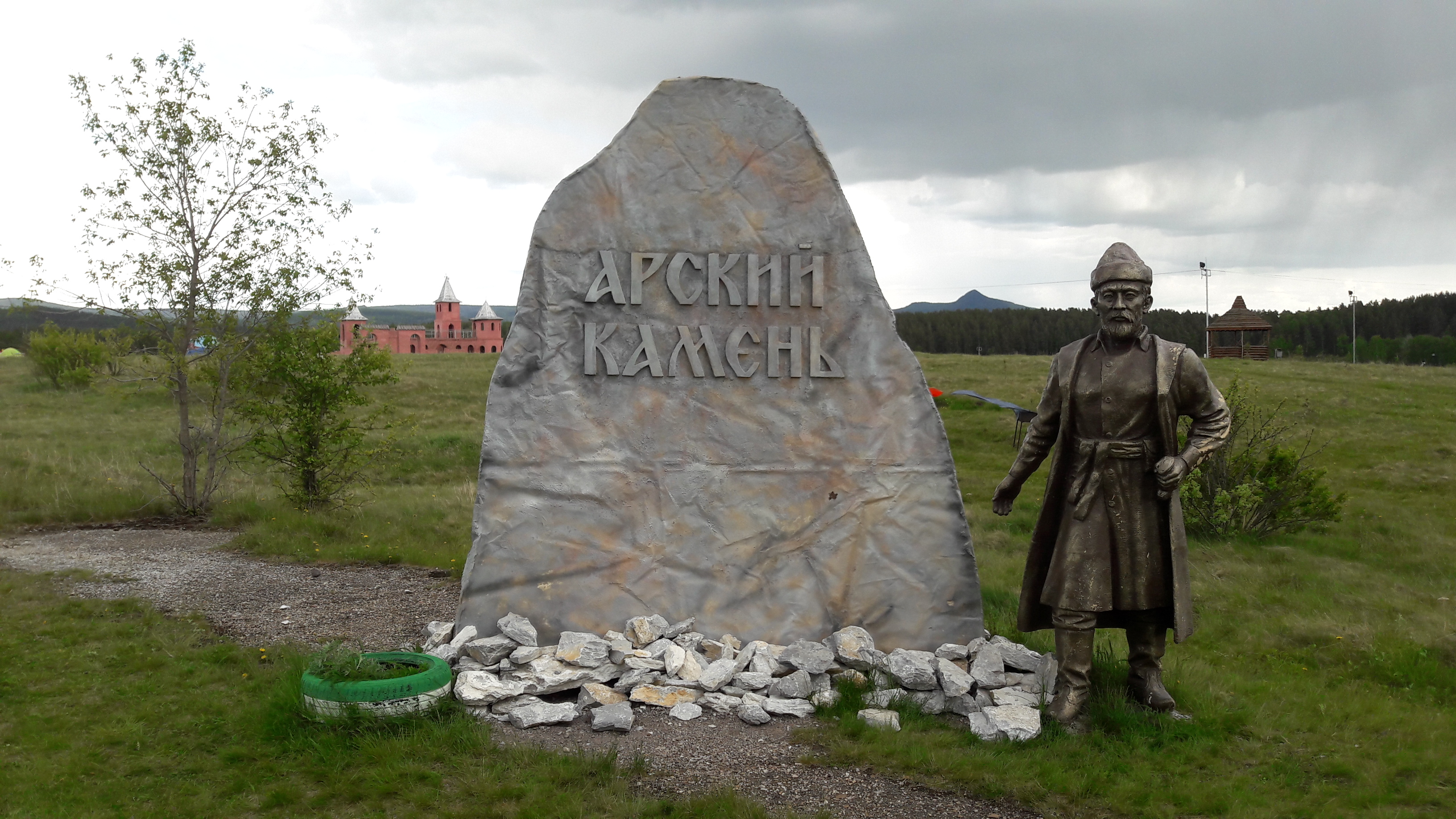 Башкортостан, Белорецкий район. Арский Камень